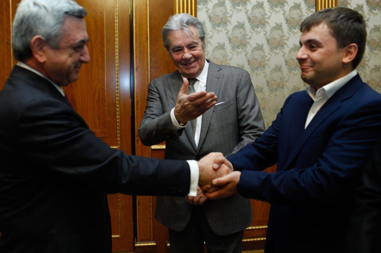 Президент Армении Серж Саргсян, Ален Делон и Валерий Саарян